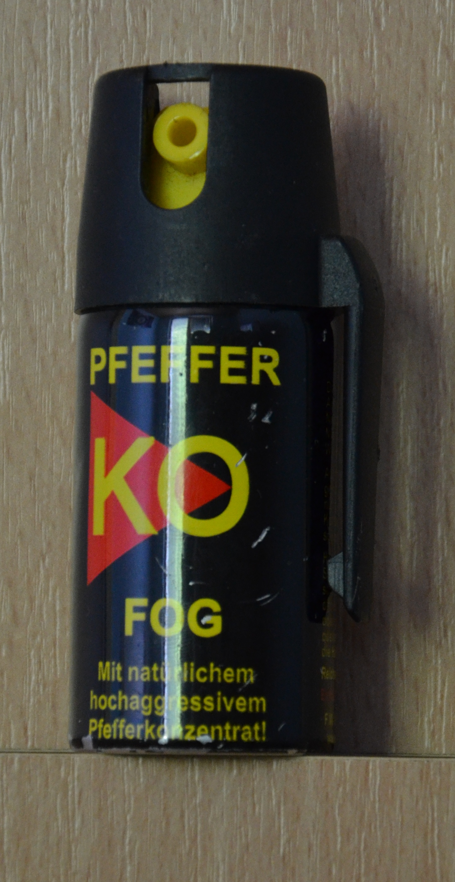 Majhen plinski razpršilec